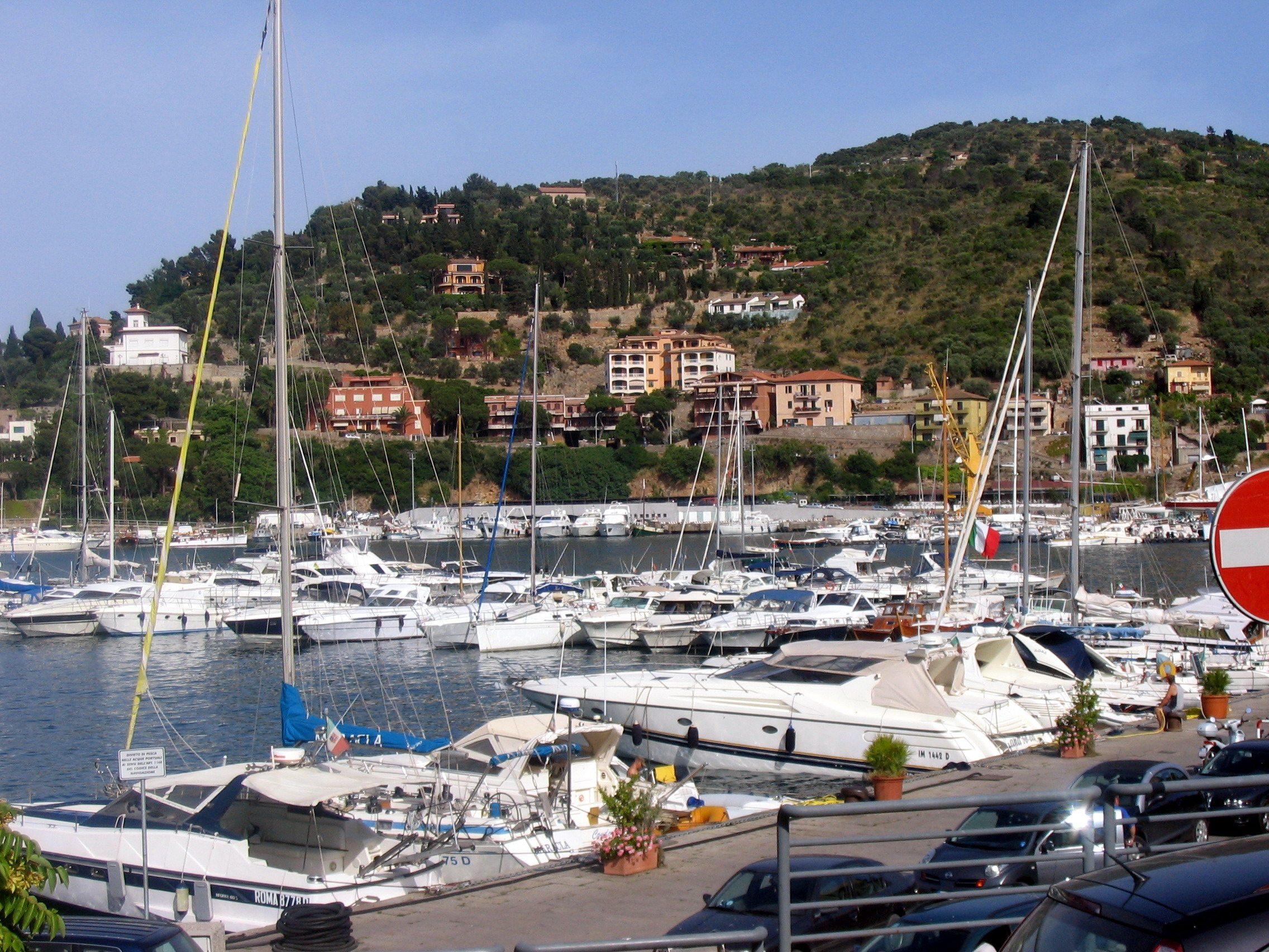 Porto Santo Stefano, Toscana, Italia